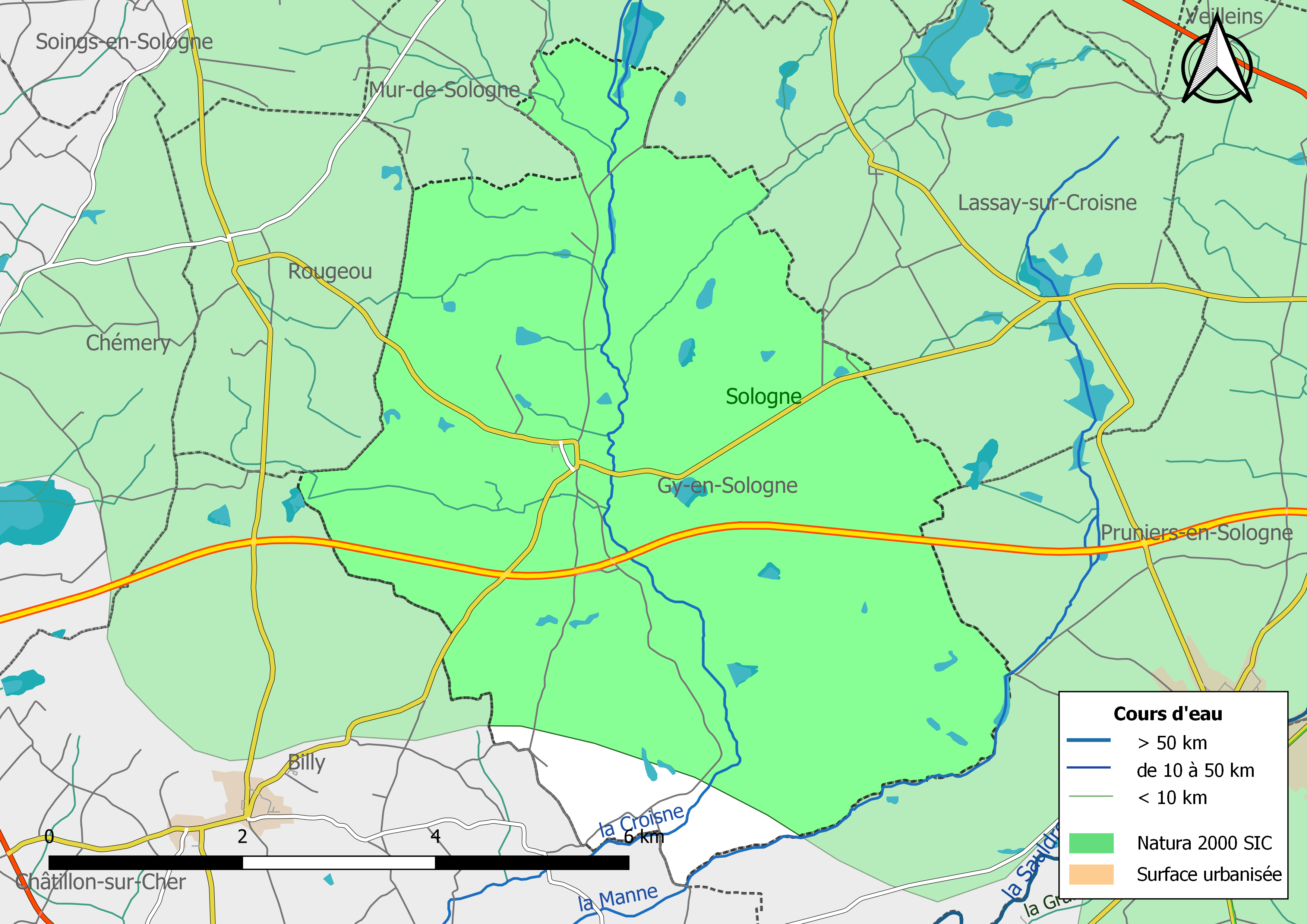 Zones Natura 2000 de type SIC de la commune de Gy-en-Sologne (Loir-et-Cher, France).